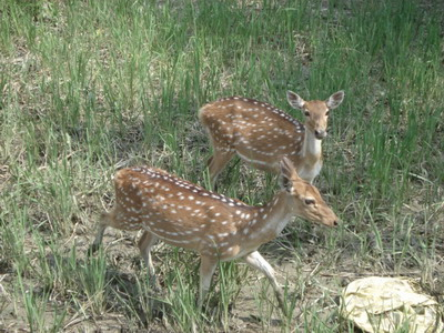 Deers in KOROM JOL Sundarbon MONGLA., Bangladesh